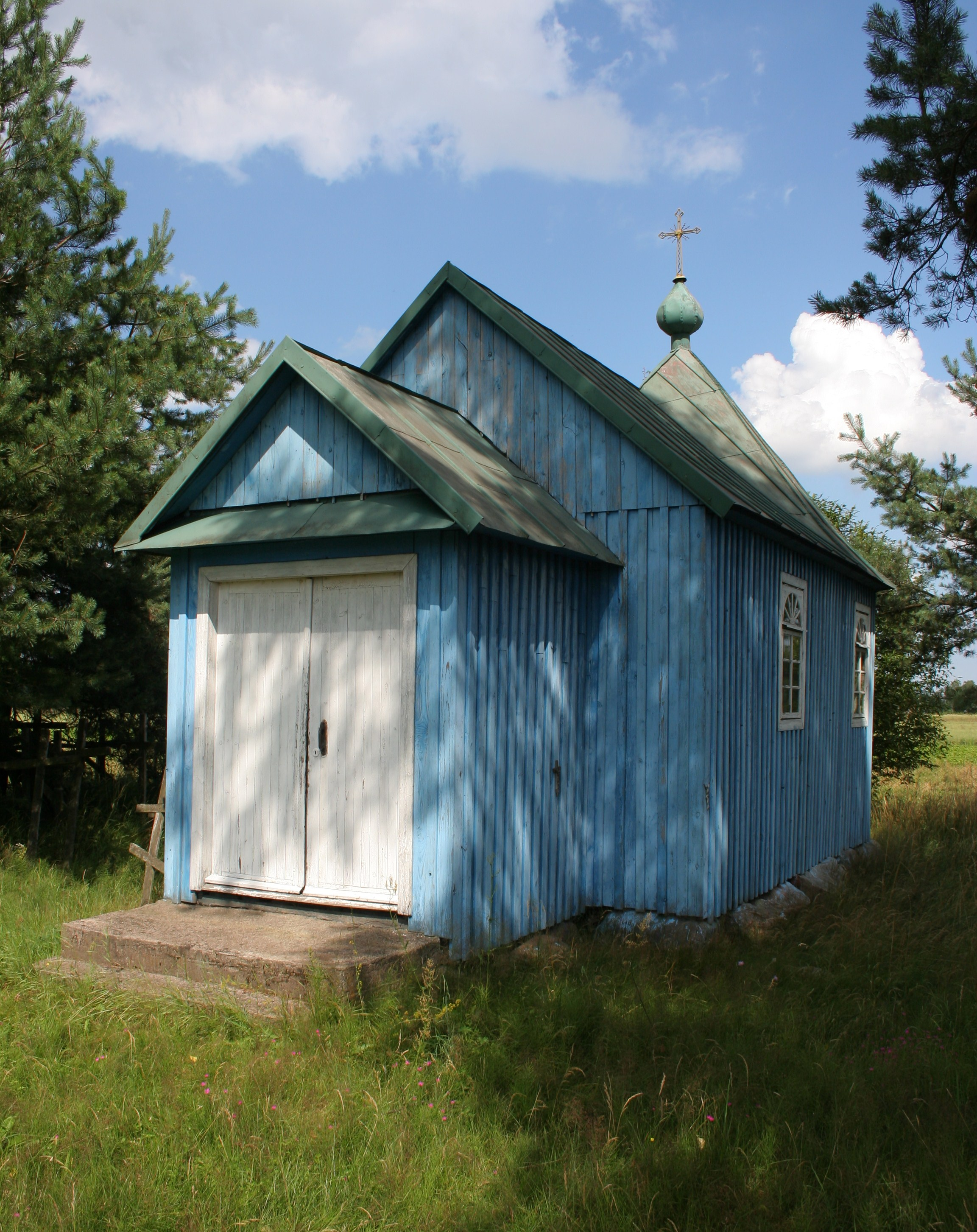 Cerkiew św. Braci Machabeuszy w Ladach.